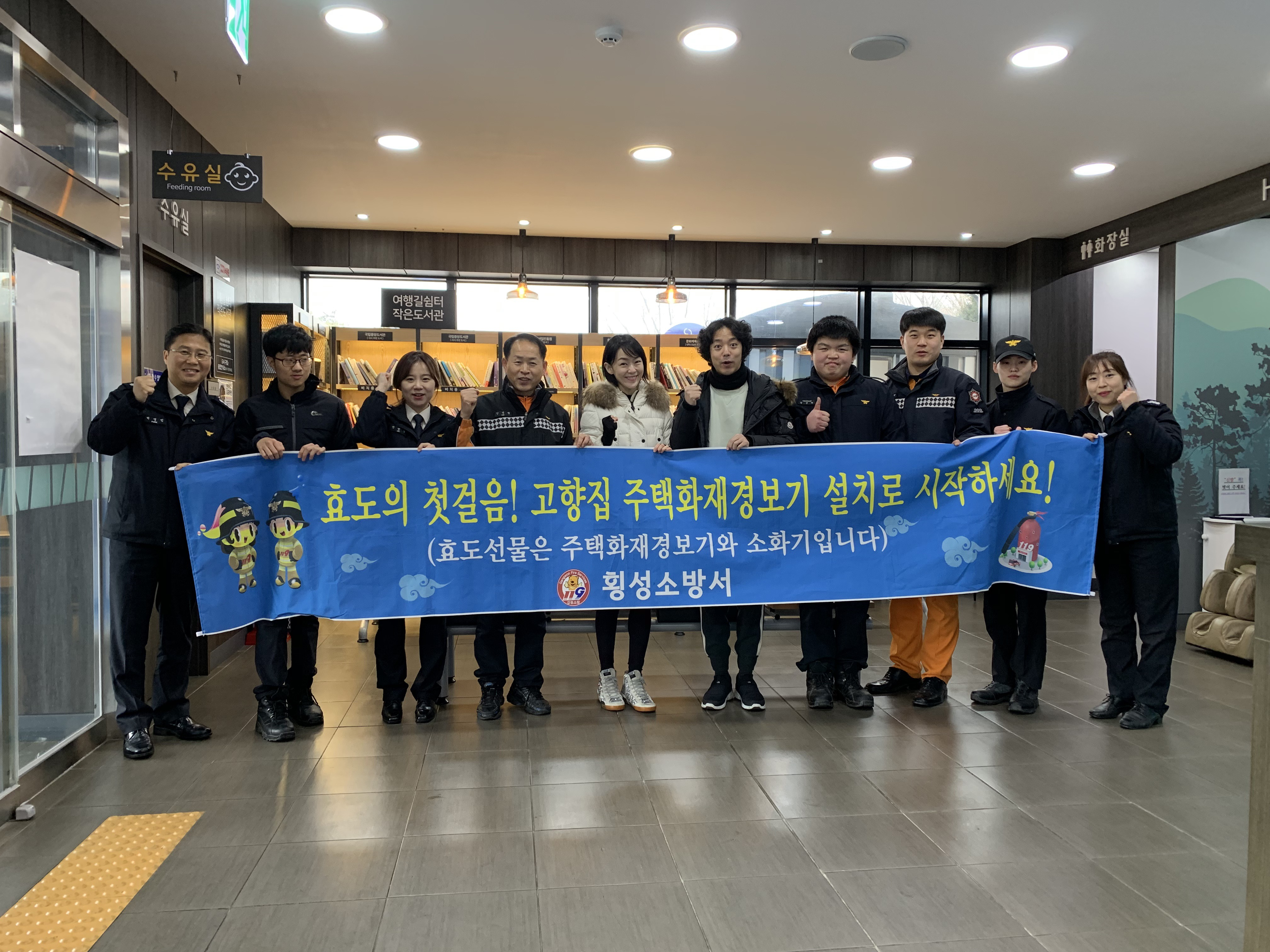 자우림 김윤아, 배우자 김형규, 횡성소방서 소방령 박영민, 소방교 진민경, 예방담당 김정림, 소방교 신호성, 소방교 안효영, 설 고향집 주택용 소방시설 선물하기 캠페인